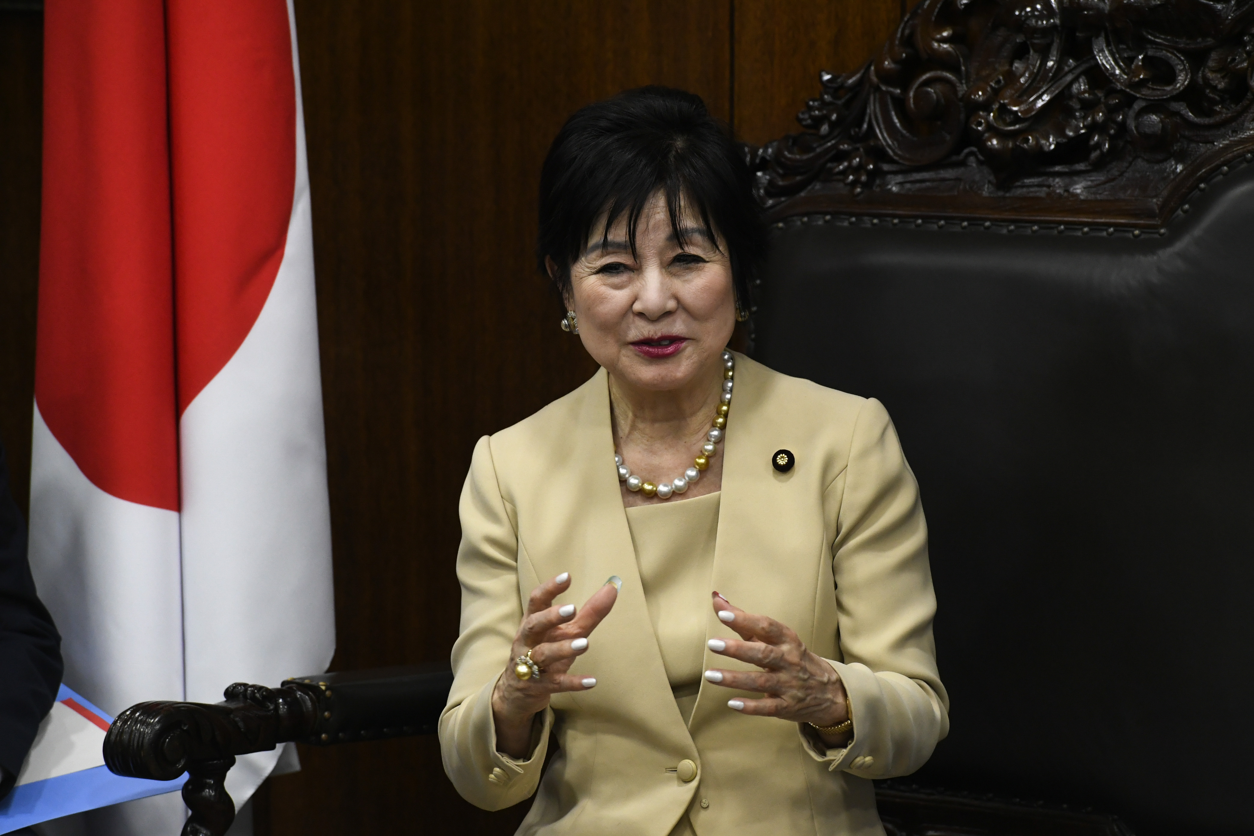 Visita oficial da presidente da Câmara dos Conselheiros do Japão (Câmara Alta da Dieta Nacional do Japão) e delegação. Em destaque, presidente da Câmara dos Conselheiros e chefe da delegação, Akiko Santo. Foto: Roque de Sá/Agência Senado